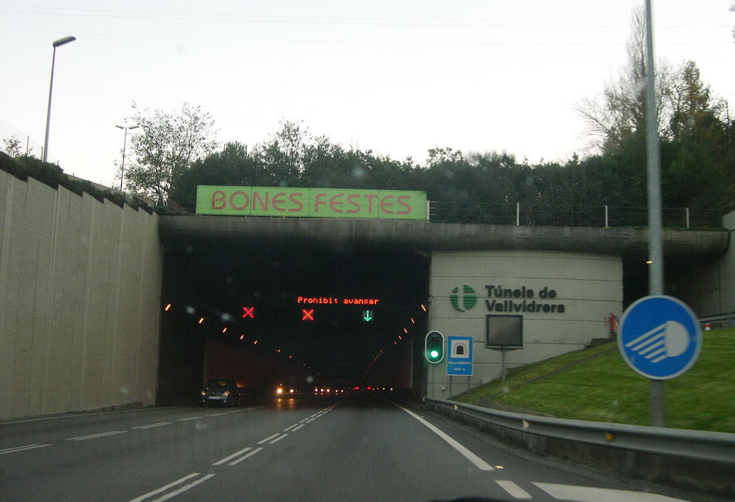 Boca nord del túnel de Vallvidrera